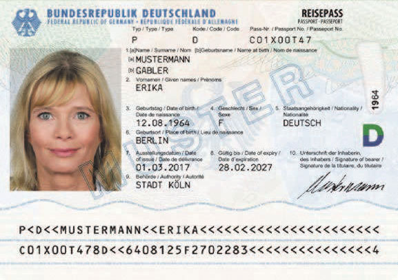 Passkartendatenseite des deutschen Reisepasses von Erika Mustermann (Muster 2017).